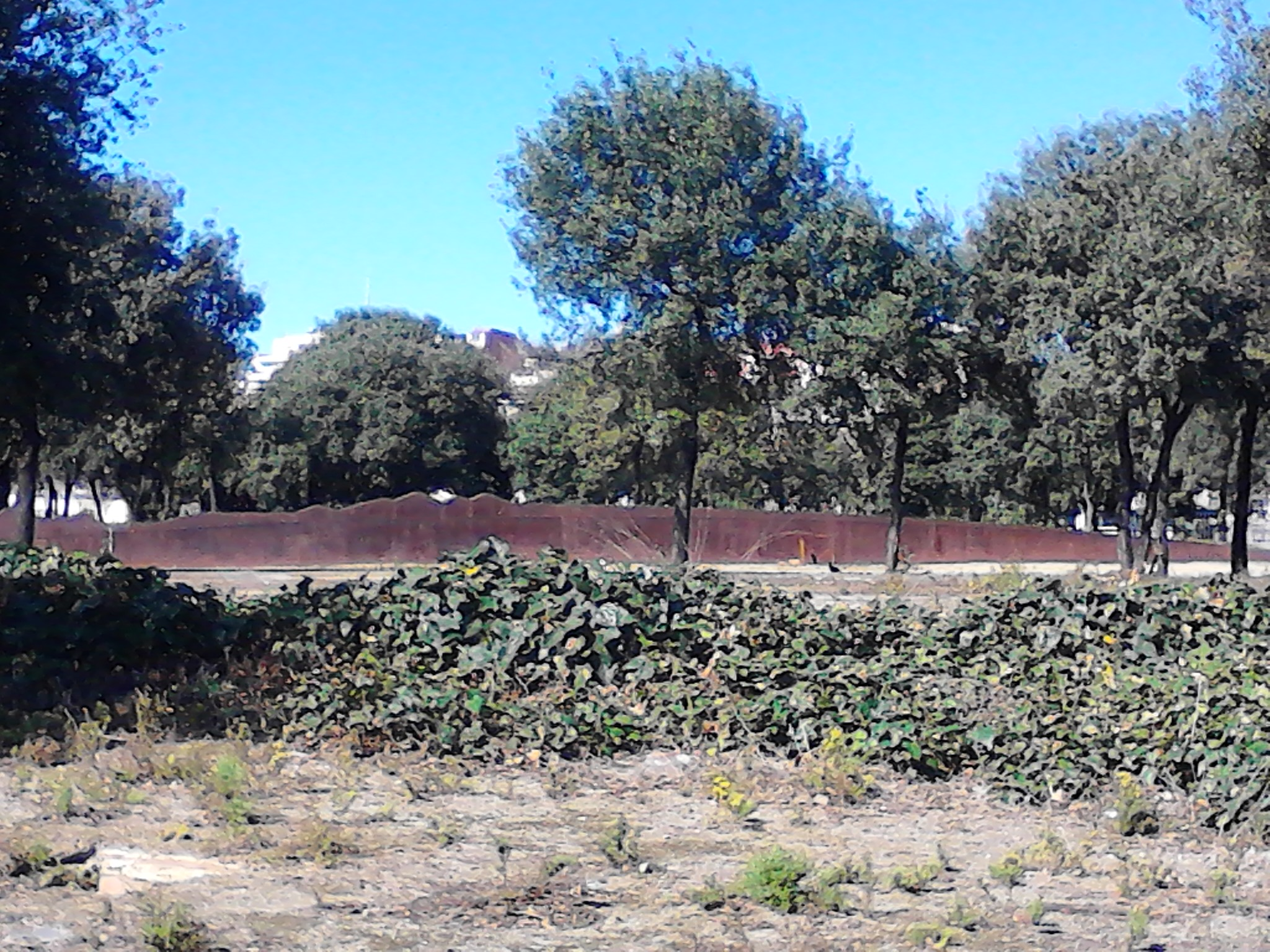 Meridià. Pl. de les Glòries Catalanes (Barcelona)